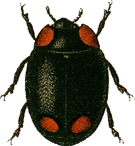 This file has been extracted from another file: Jacobs24.jpg